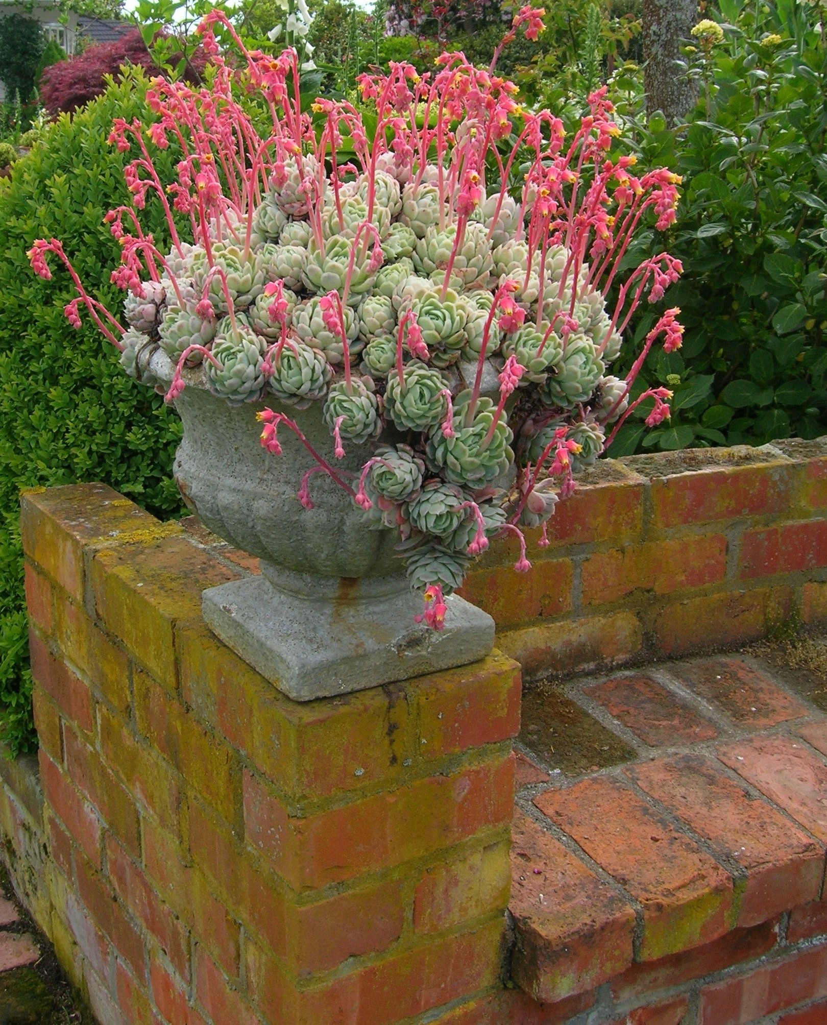 i110305a 115